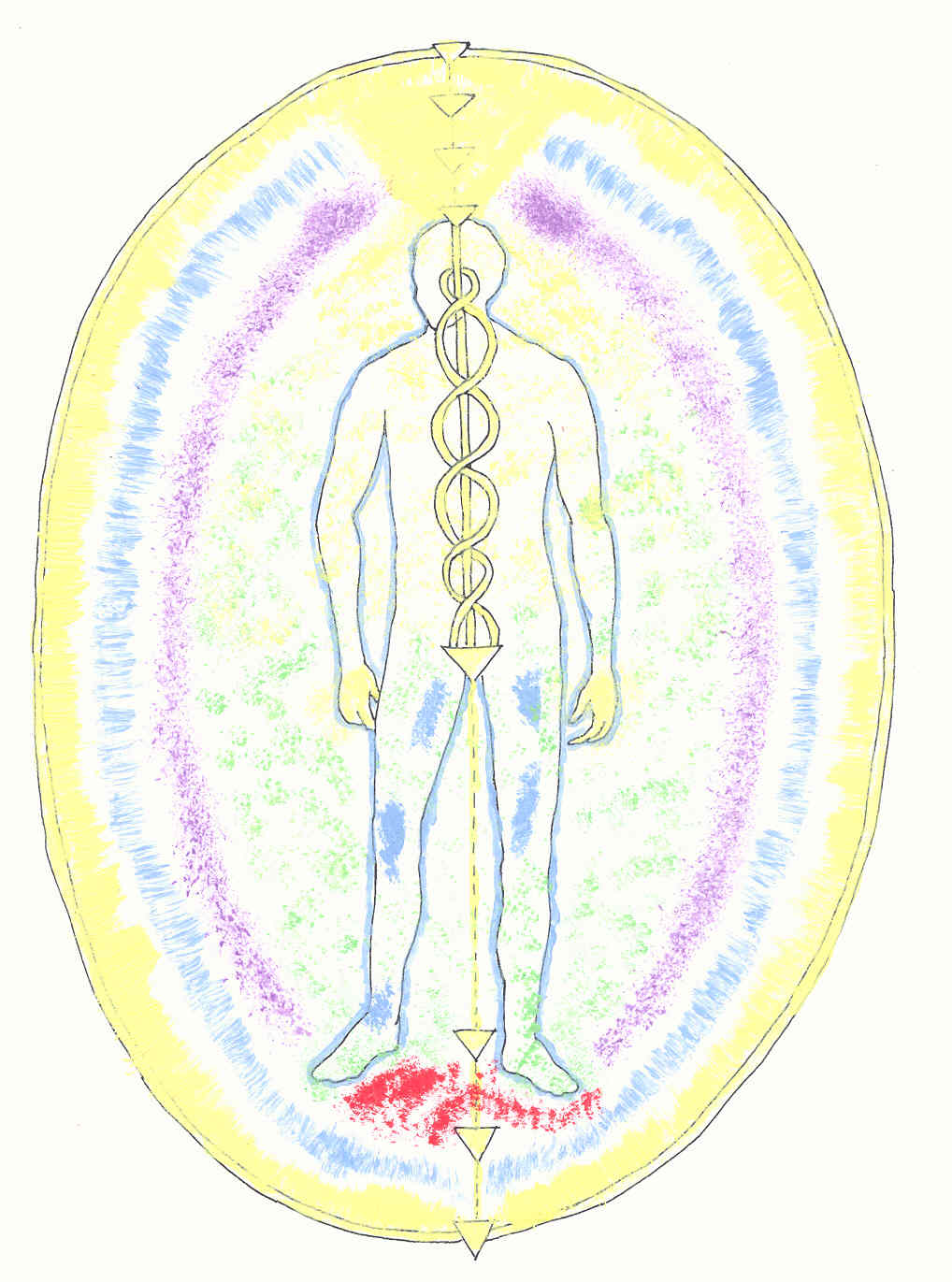 Afbeelding van koendaliniekanalen en centra Zelfgemaakt, geen auteursrechten